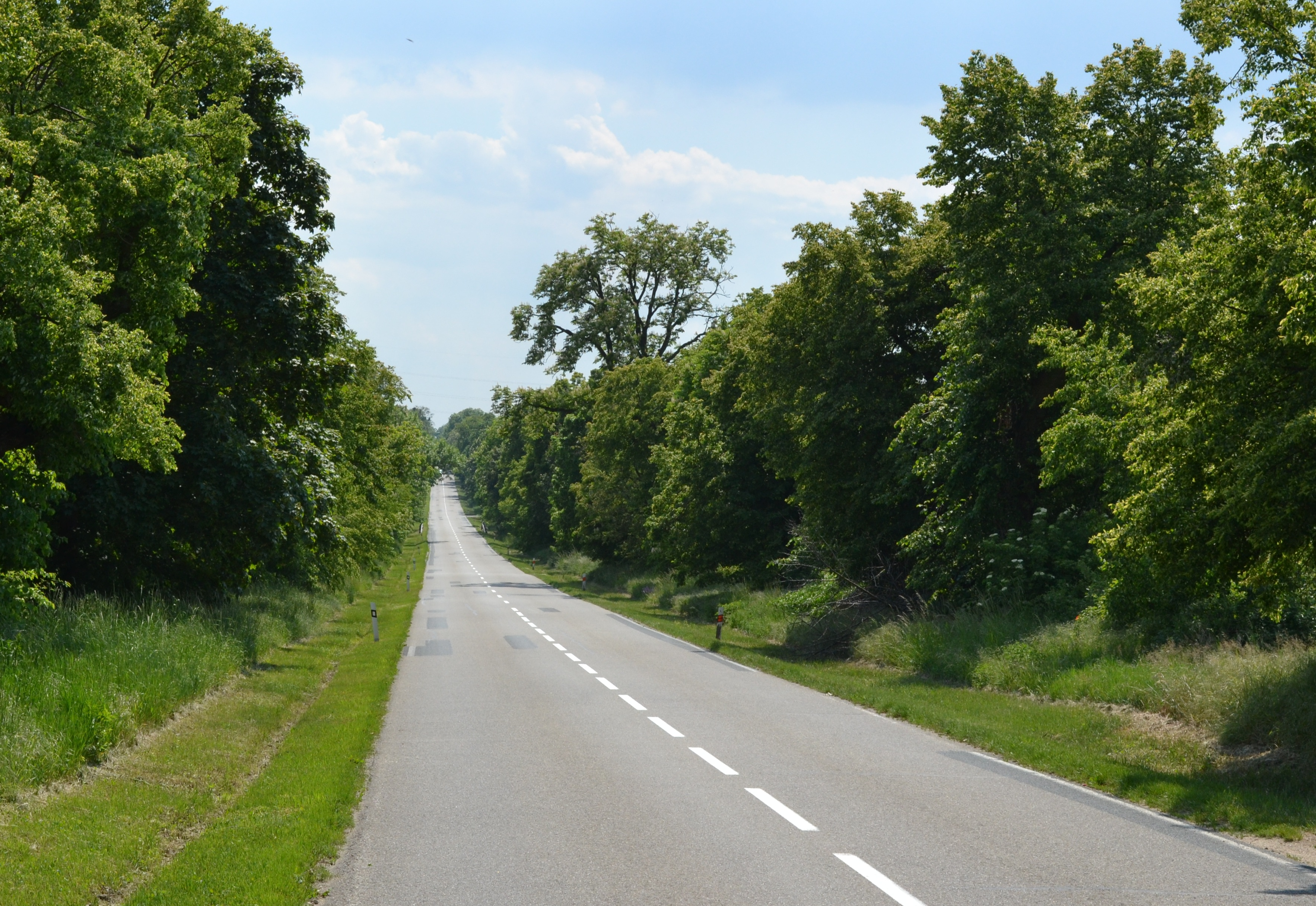 Bezručova alej mezi Lednicí a Valticemi, okres Břeclav. Prochází jí silnice II/422.